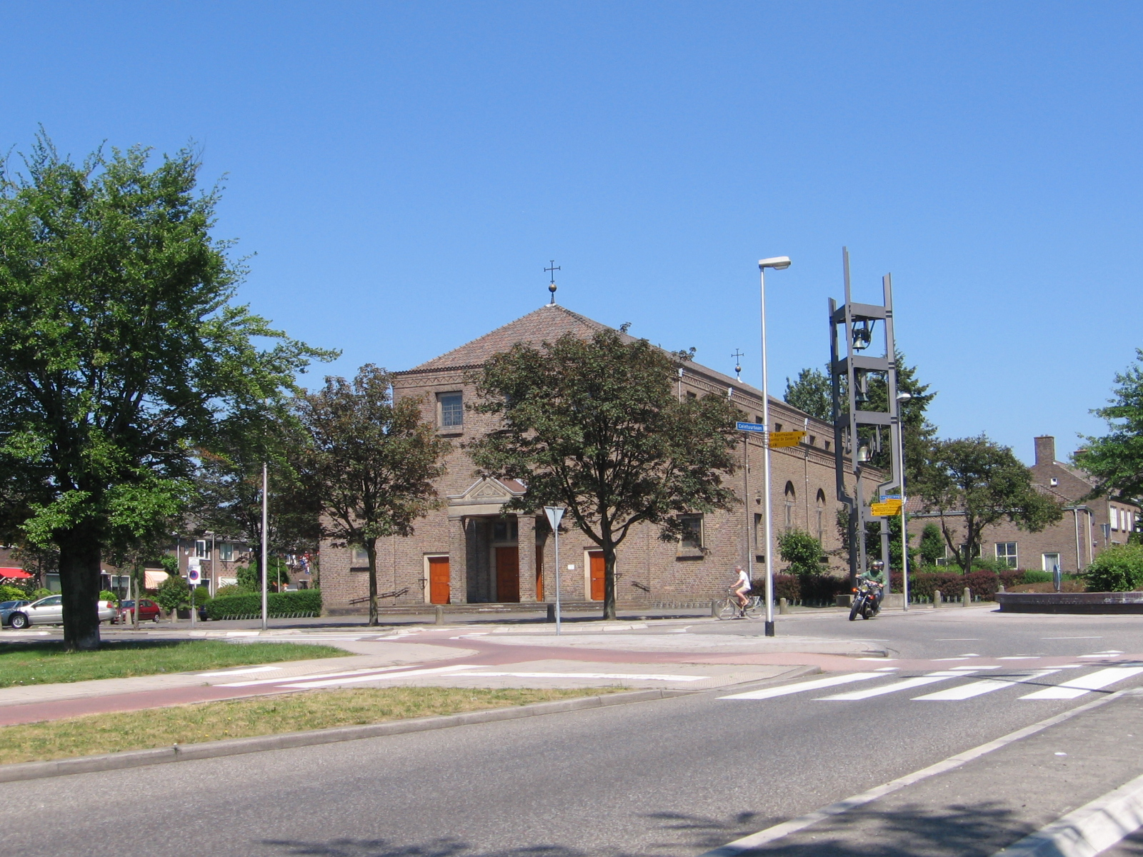 Sint-Jozefkerk, Bussum, juni 2006